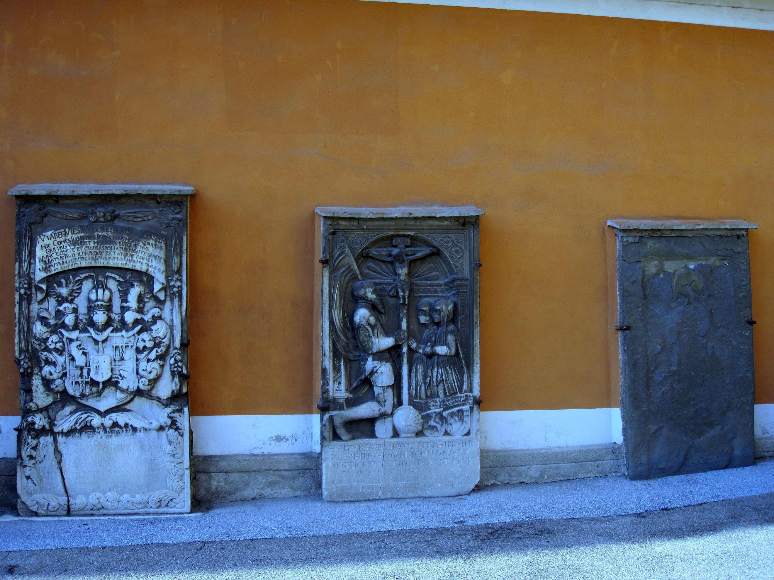 Karmeliterkreuz mit ehem. Klostermauer